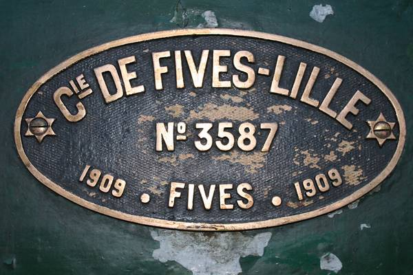 Plaque de constructeur de la 230T E 332 du Réseau Breton